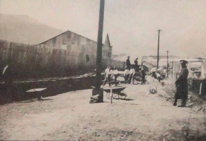 Apenados trabalhando nas ruas de Ushuaia